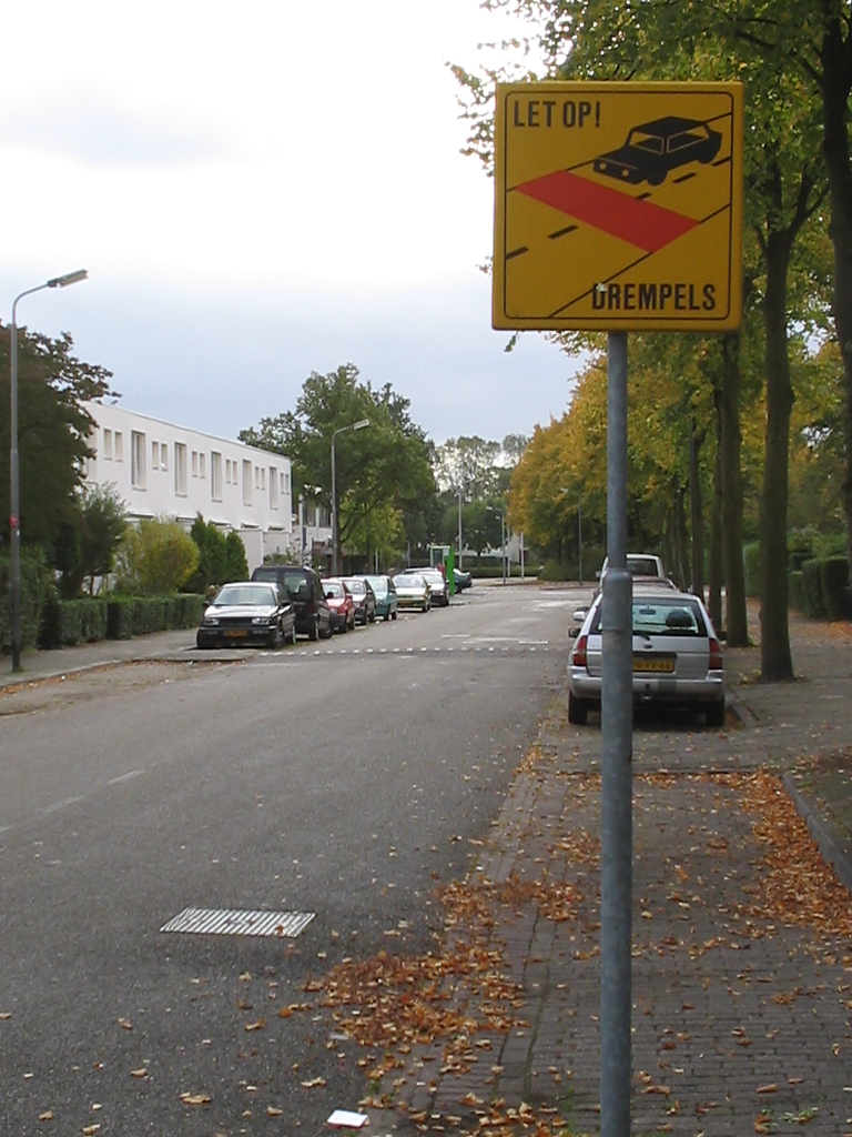 verkeersdrempel en verouderd waarschuwingsbord